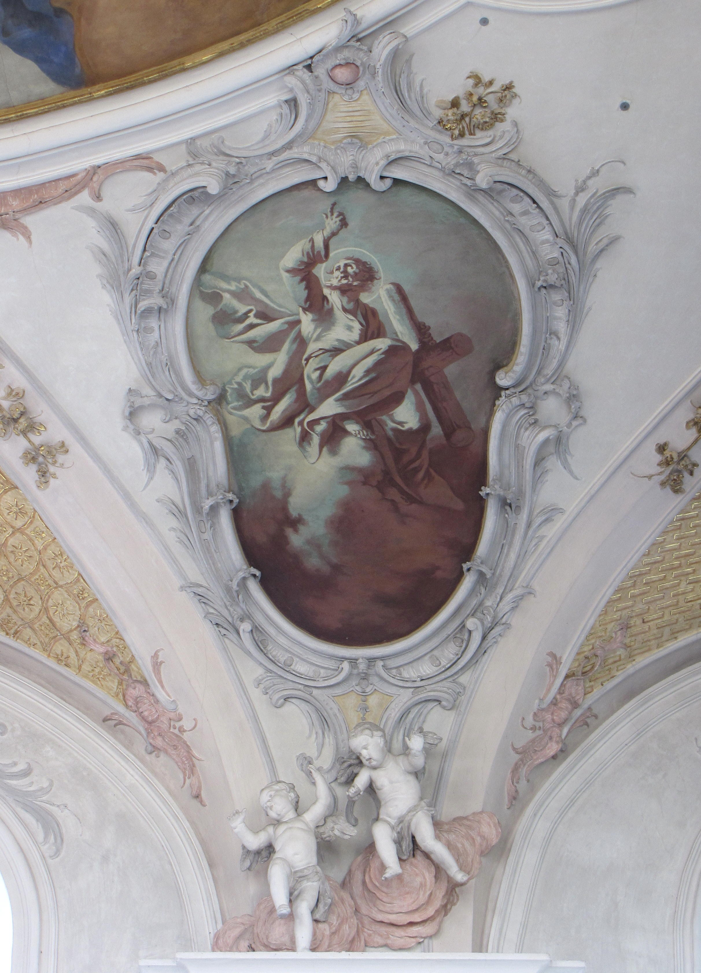 Hl. Apostel Andreas, Tonmalerei in einem der Nebenbilder des Langhauses der Pfarrkirche Denklingen